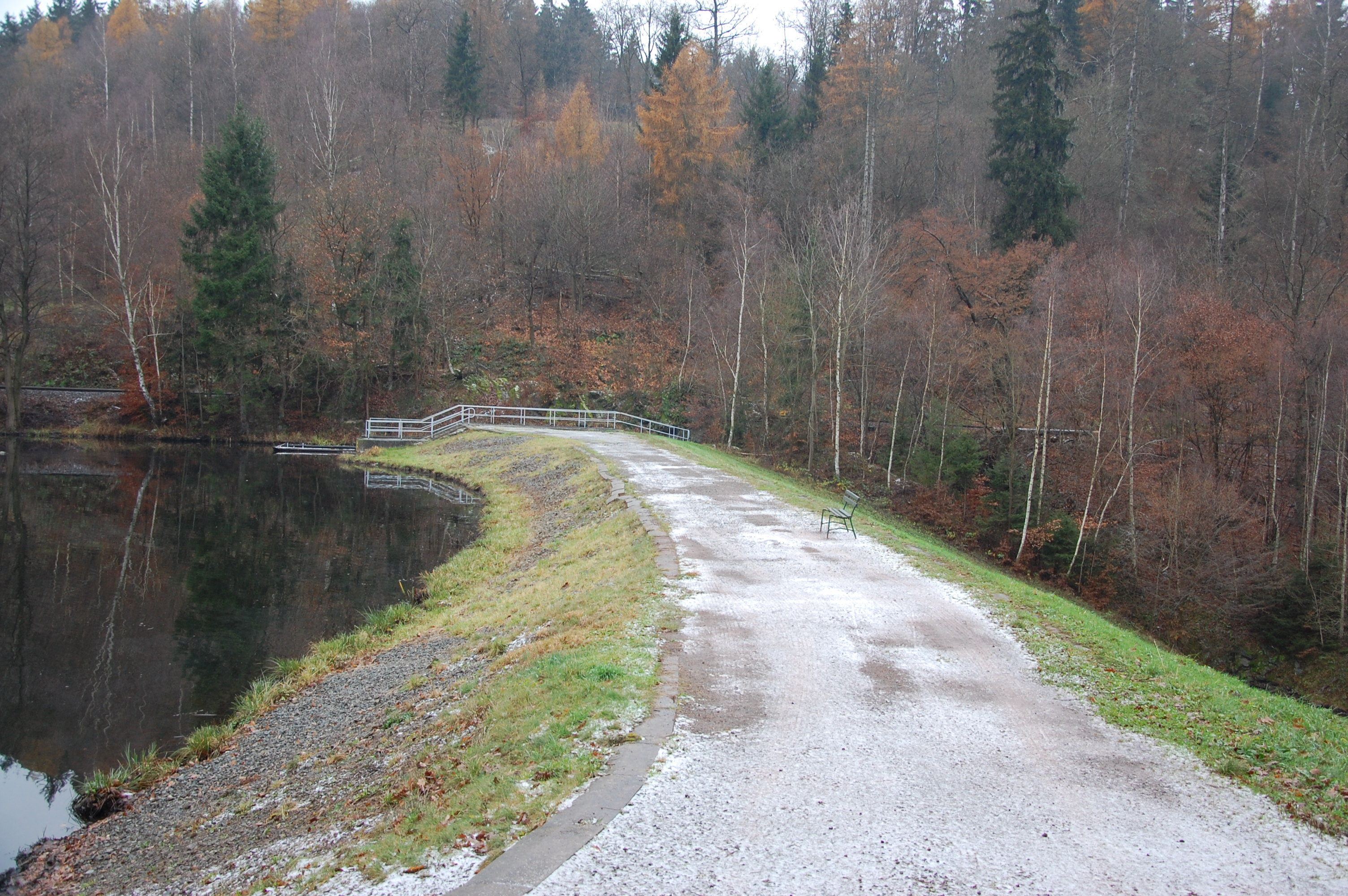 Heiliger Teich bei Gernrode, Deichkrone